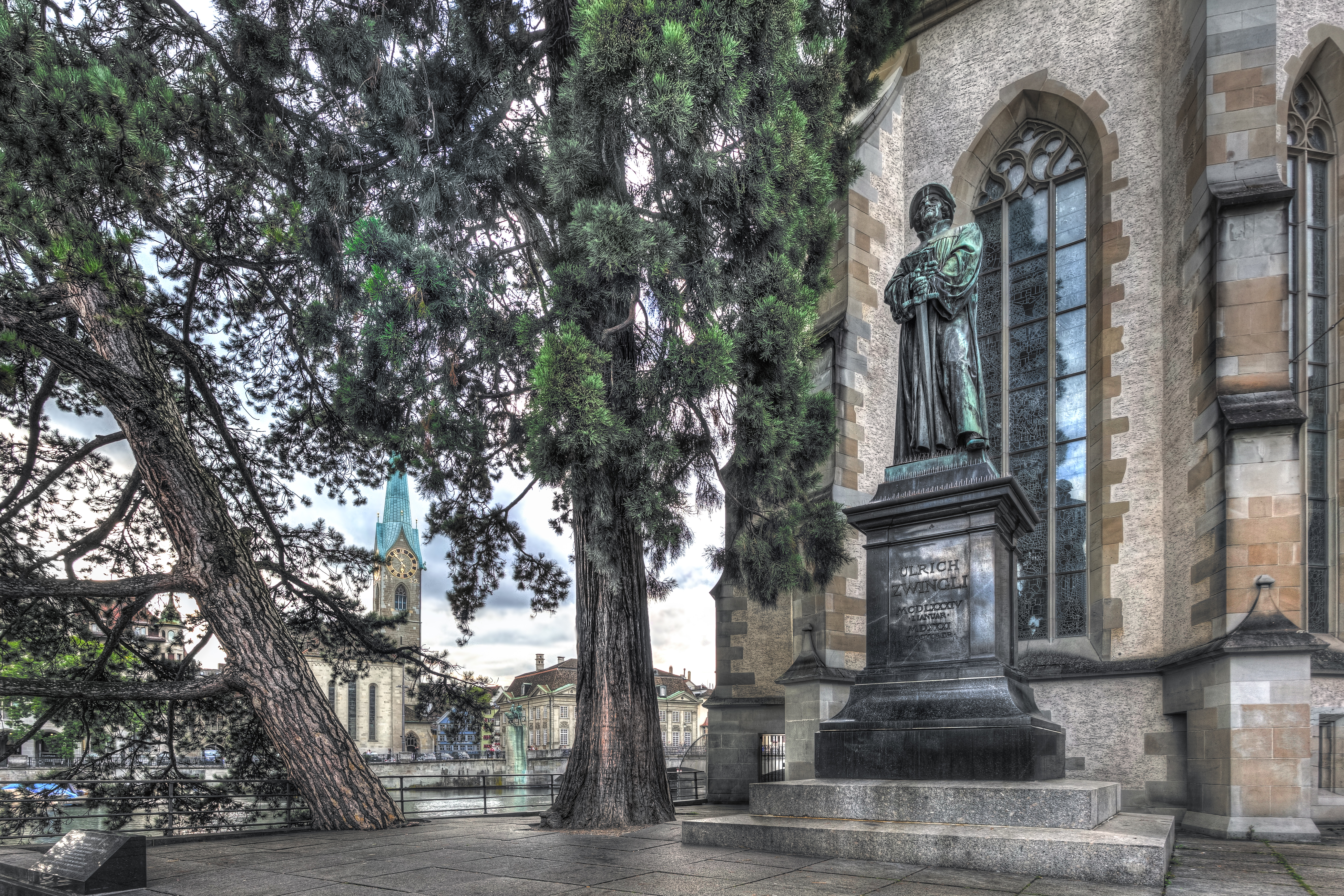 Ulrich Zwingli 1484-1531. Denkmal bei der Wasserkirche in Zürich. Im Hintergrund die Frauenkirche.(Tonemapping-Fotografie)